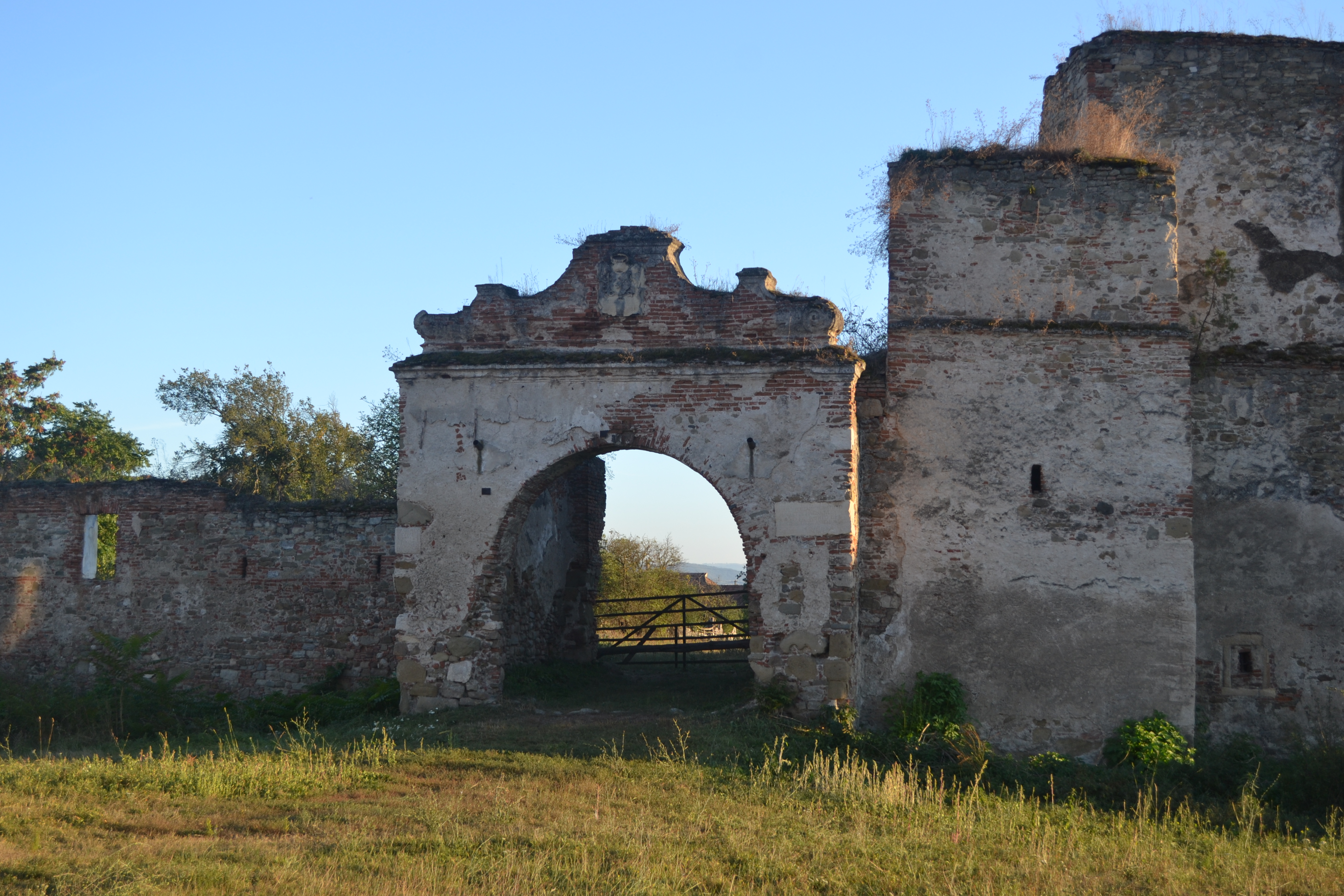 detaliu poarta